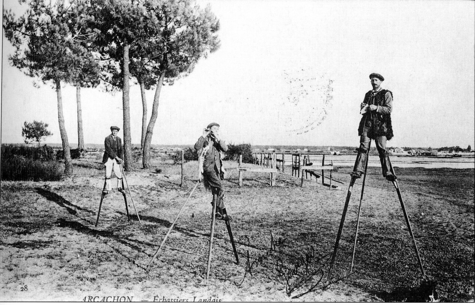 Bergers landais à Arcachon au début du XXe siècle. Copyright Catégorie: Landes de Gascogne Catégorie: Pays de Buch